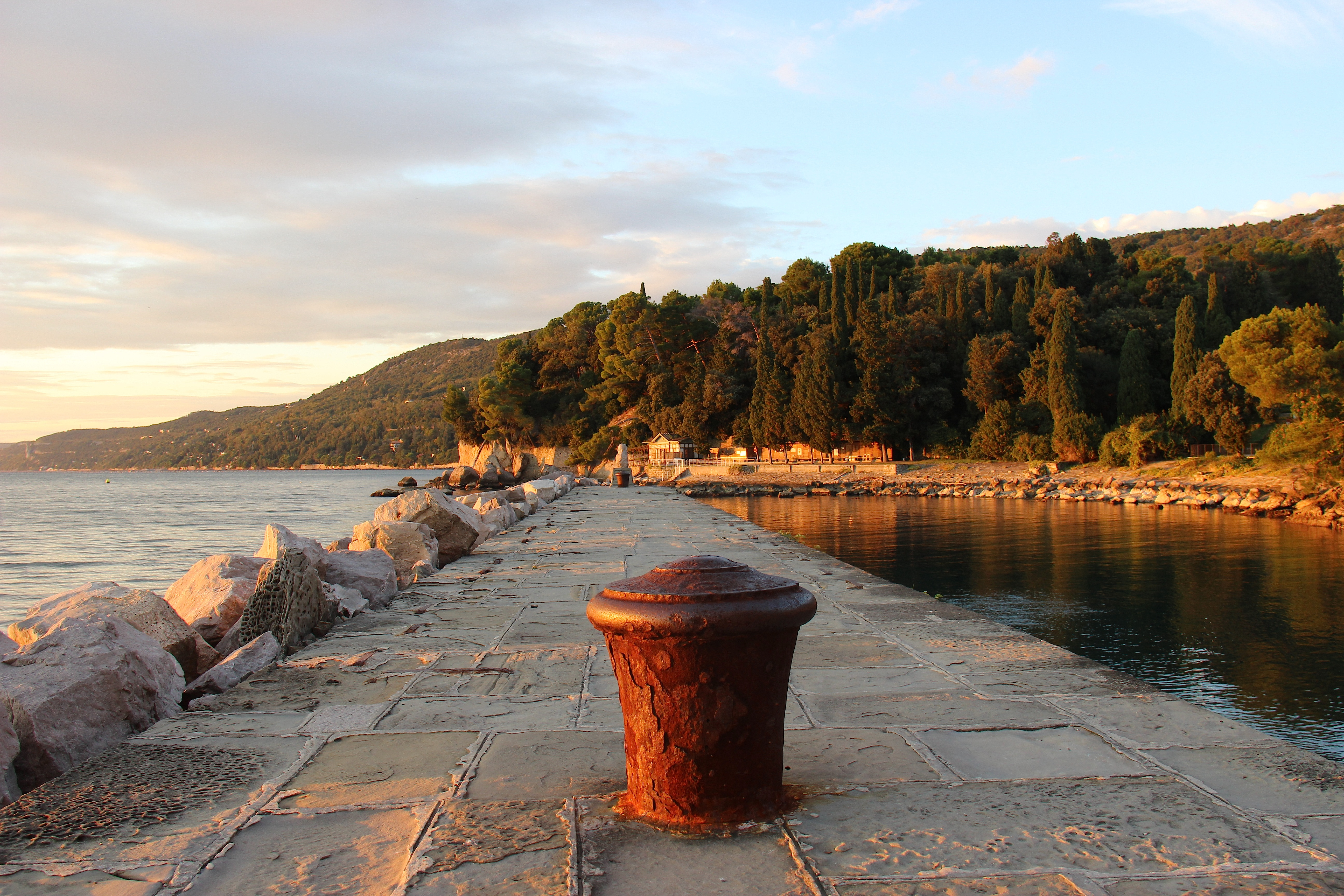 Riserva Naturale Marina di Miramare Natural Marine Reserve of Miramare This is a photo of a monument which is part of cultural heritage of Italy. The authorisation for taking photos of this object was provided by the World Wide Fund for Nature Italy.